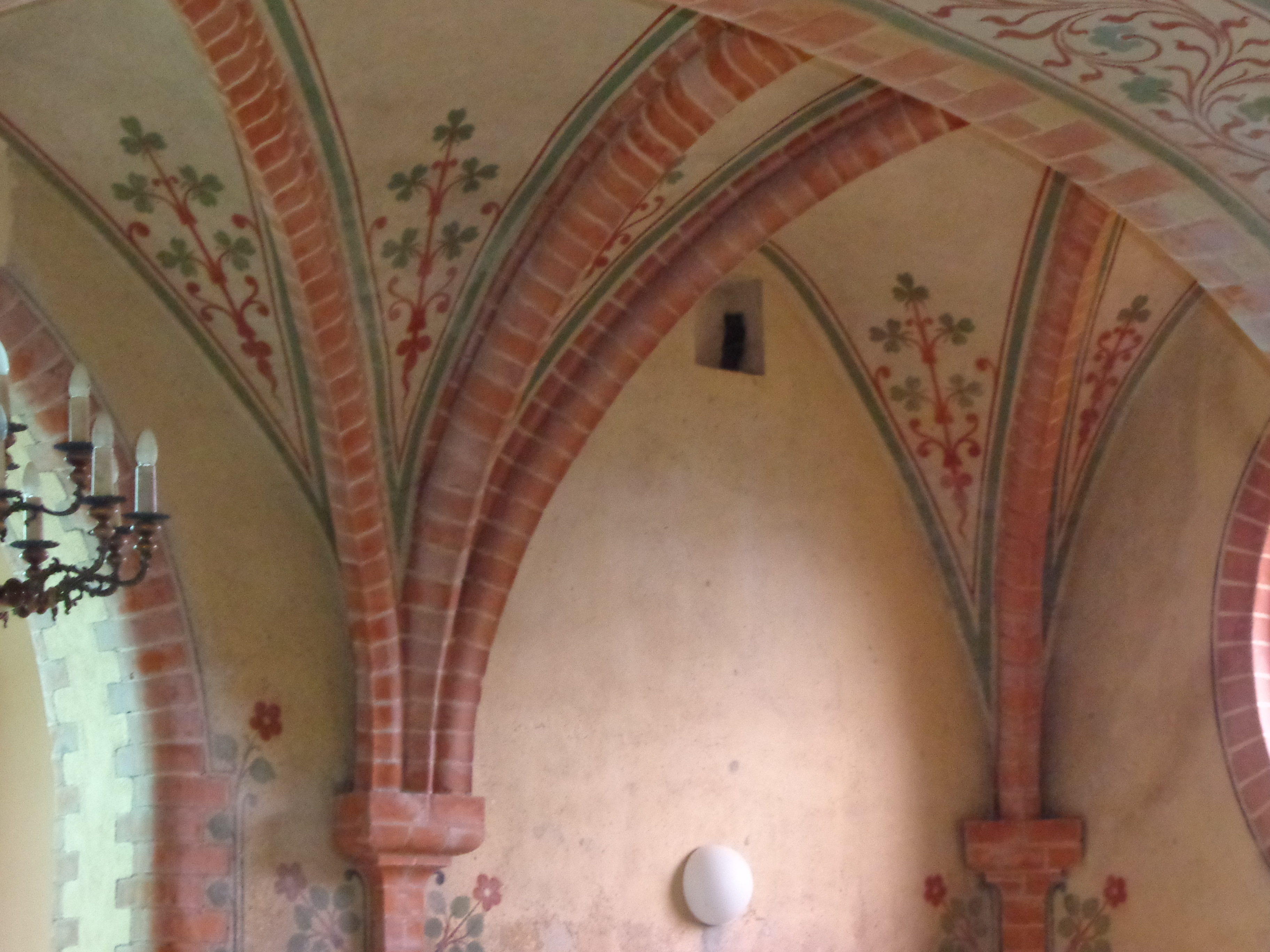 Restauriertes Gewölbe der Grabkapelle an der Dorfkirche Dobbin.